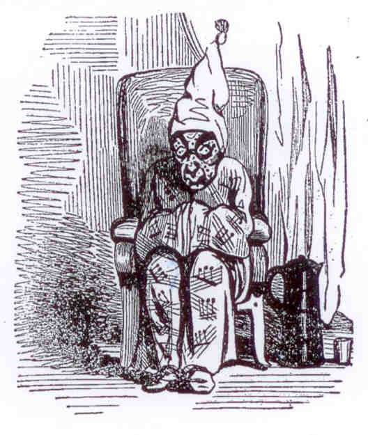 Caricature figurant Philippe Musard chez lui après le bal du Carnaval de Paris dont il a dirigé l'orchestre.